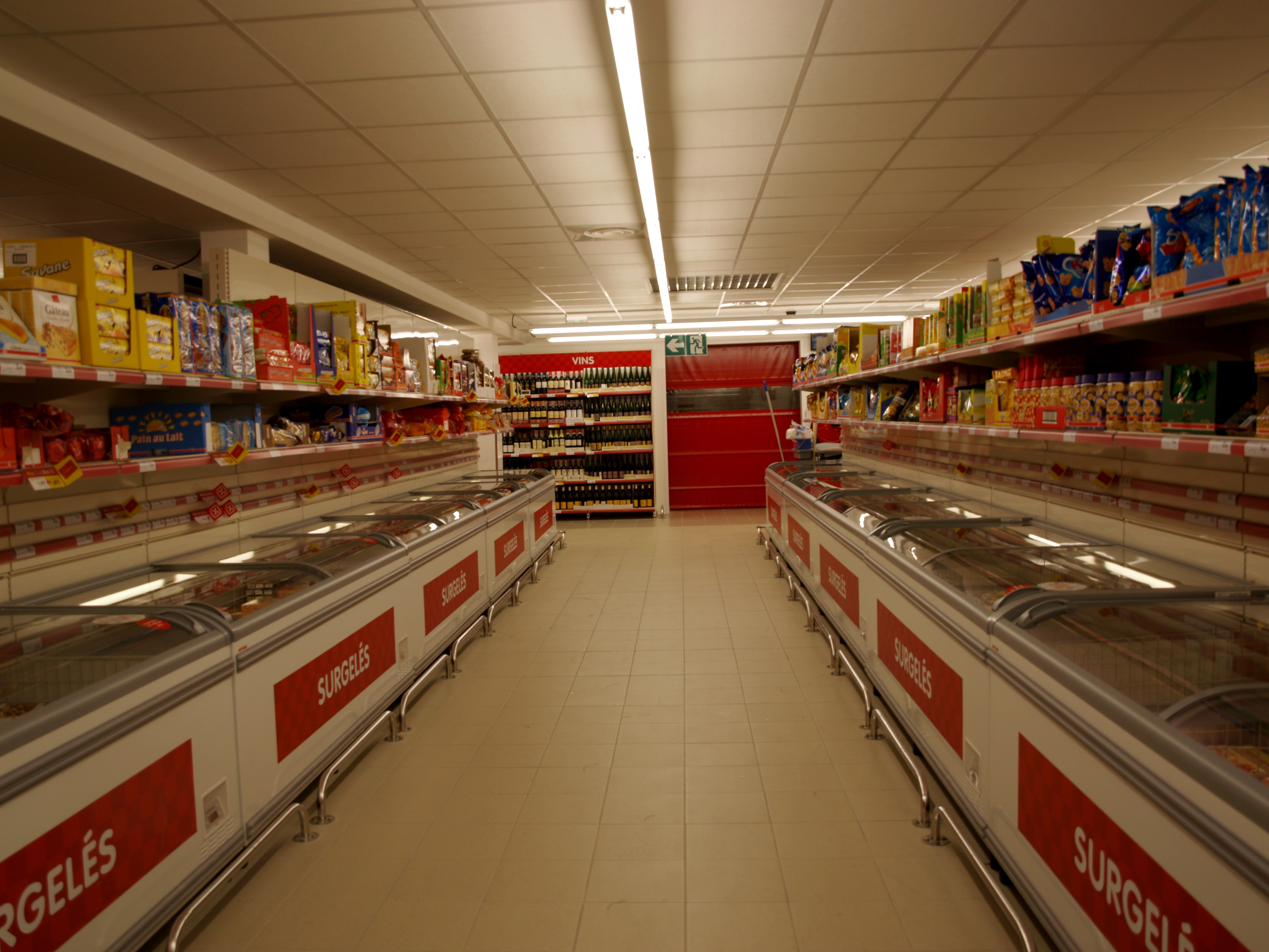 Intérieur d'un supermarché Dia à Strasbourg.